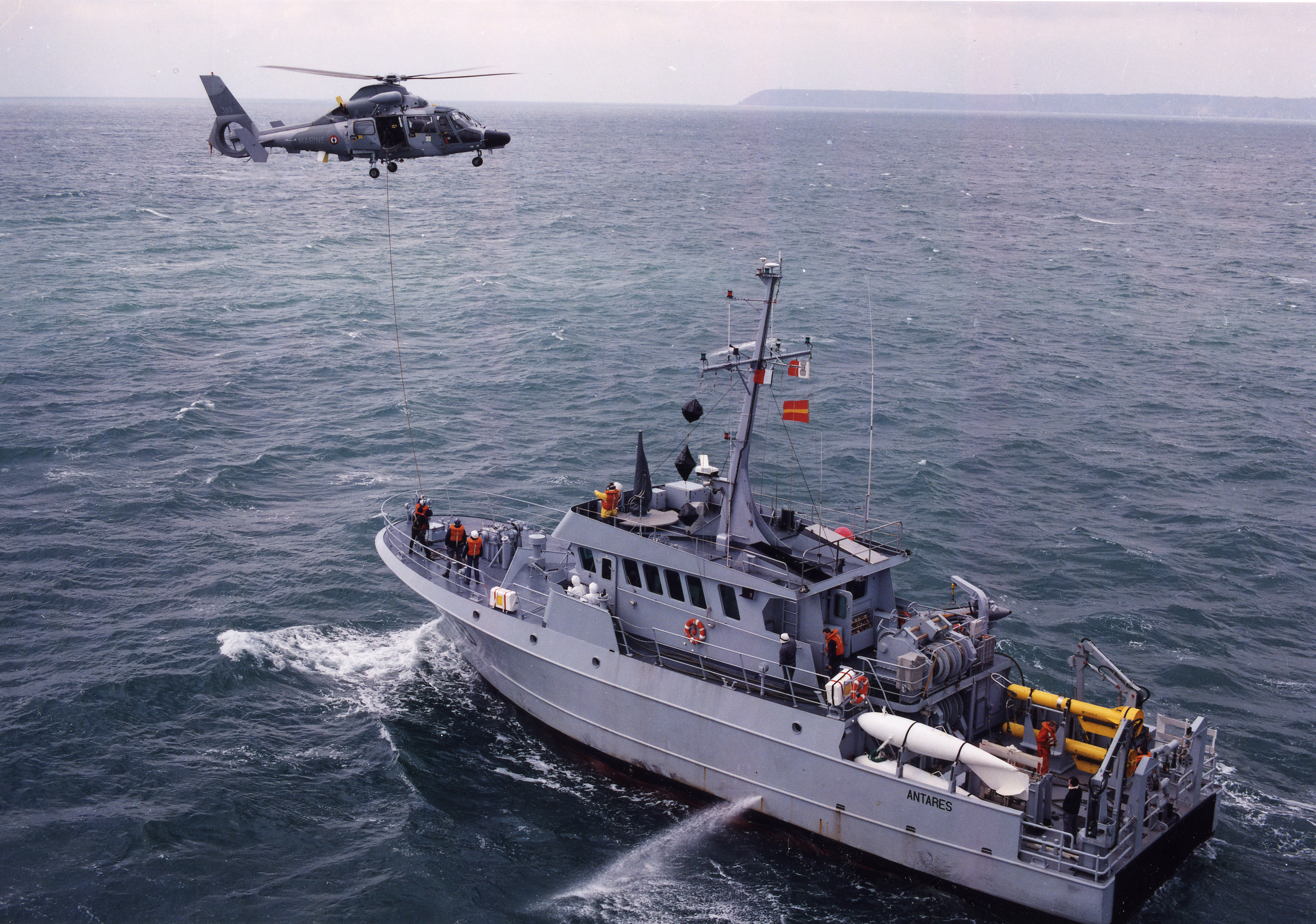 Exercice de treuillage au dessus de la place avant du bâtiment remorqueur de sonar Antarès.